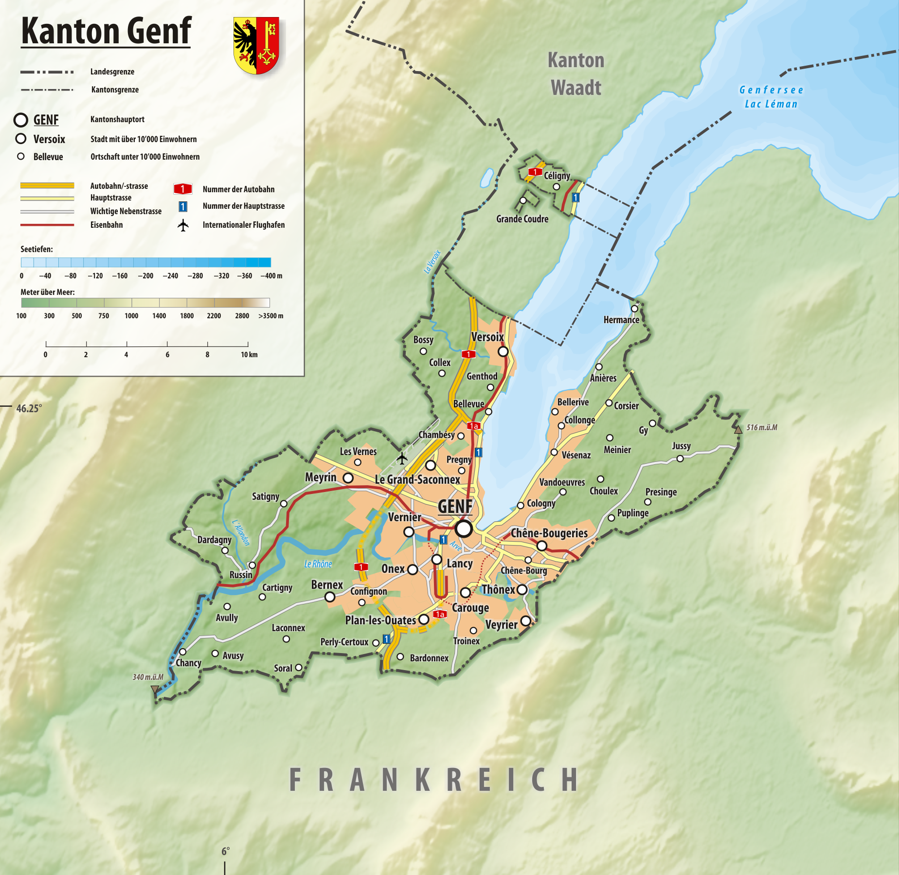 Reliefkarte des Kantons Genf Topographischer Hintergrund: NASA Shuttle Radar Topography Mission (public domain). SRTM3 v.2.